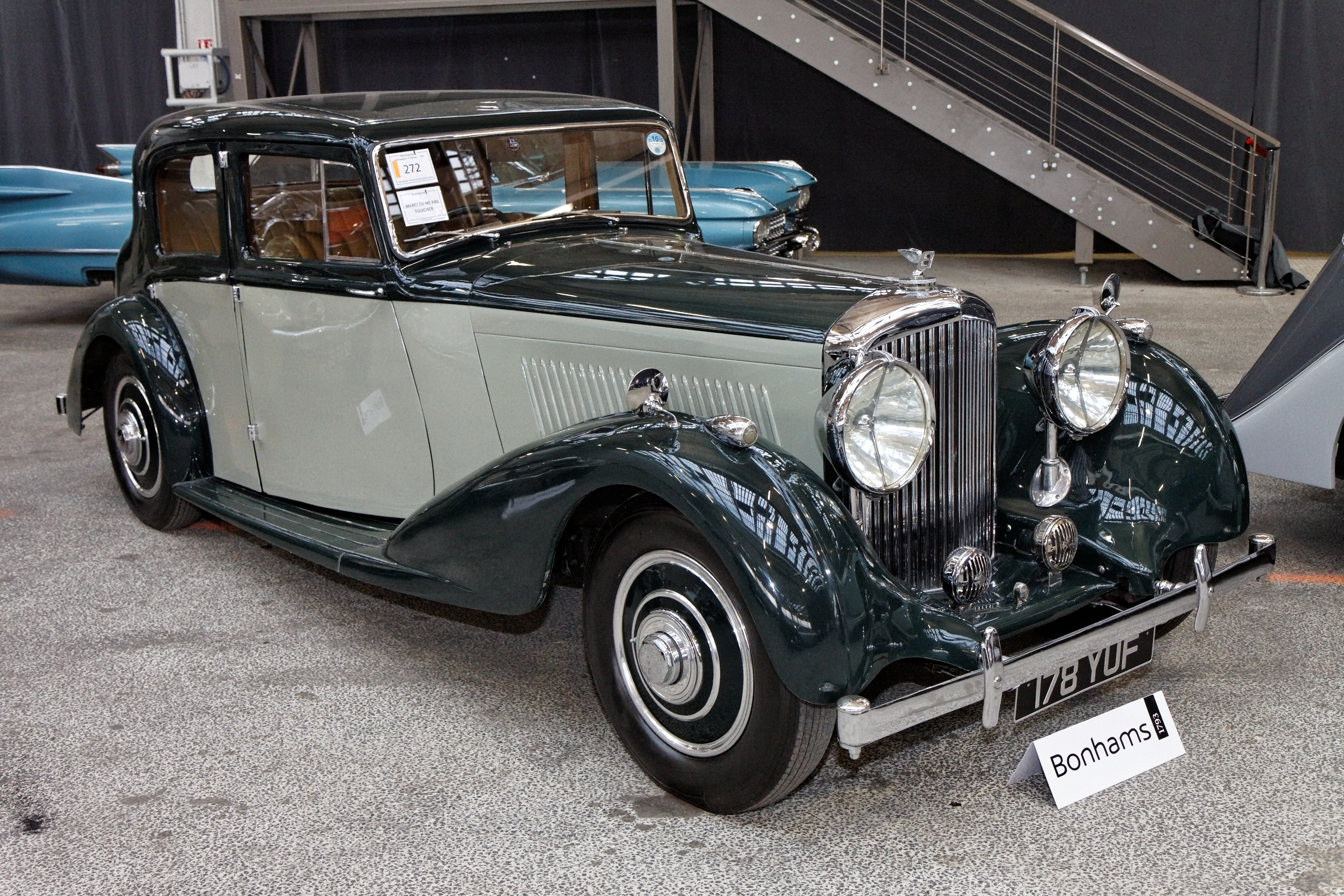 Bentley 4¼-Litre M-Series Sports Saloon